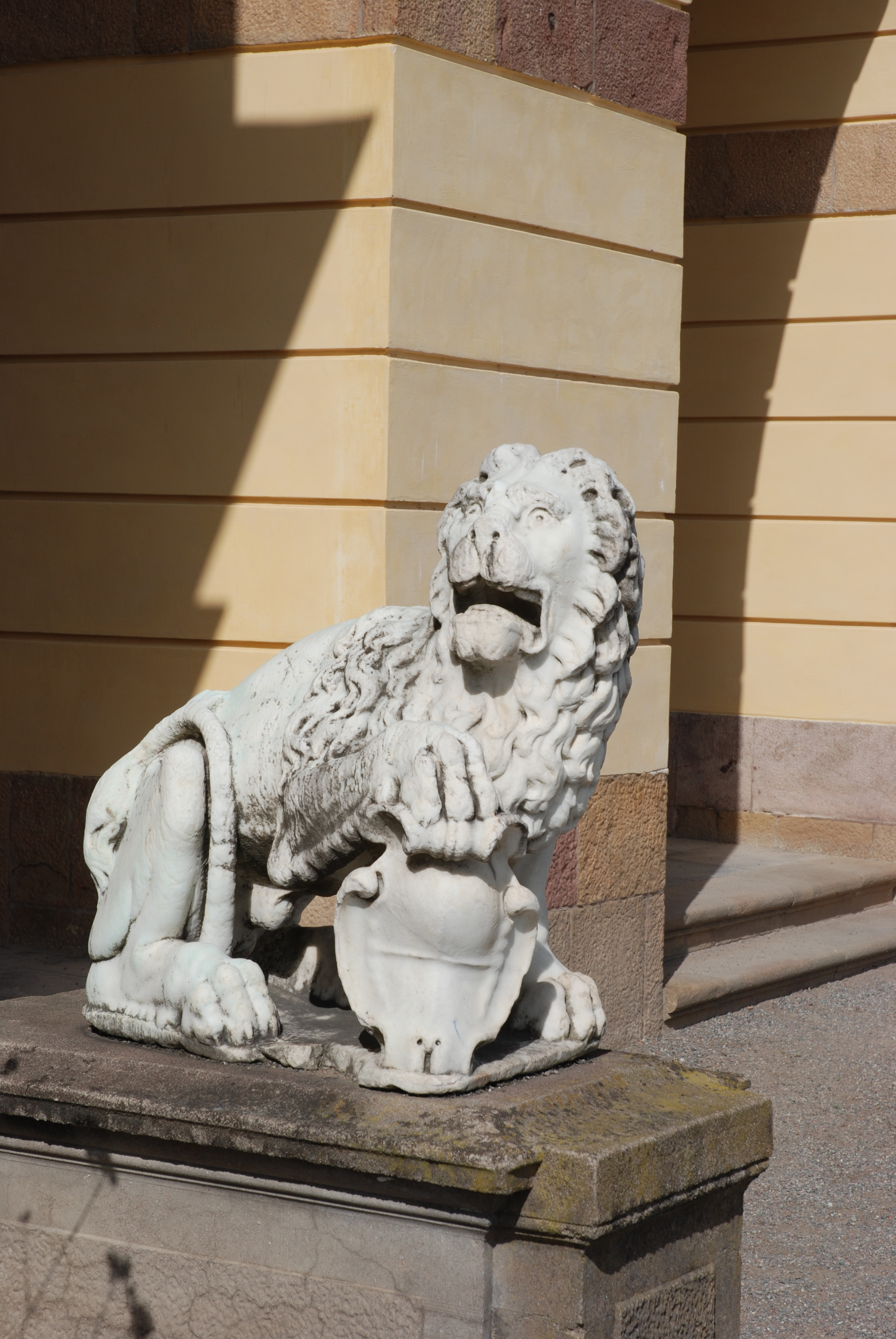 Drotningholms slott.Marmorlejon vid slottsentrén.